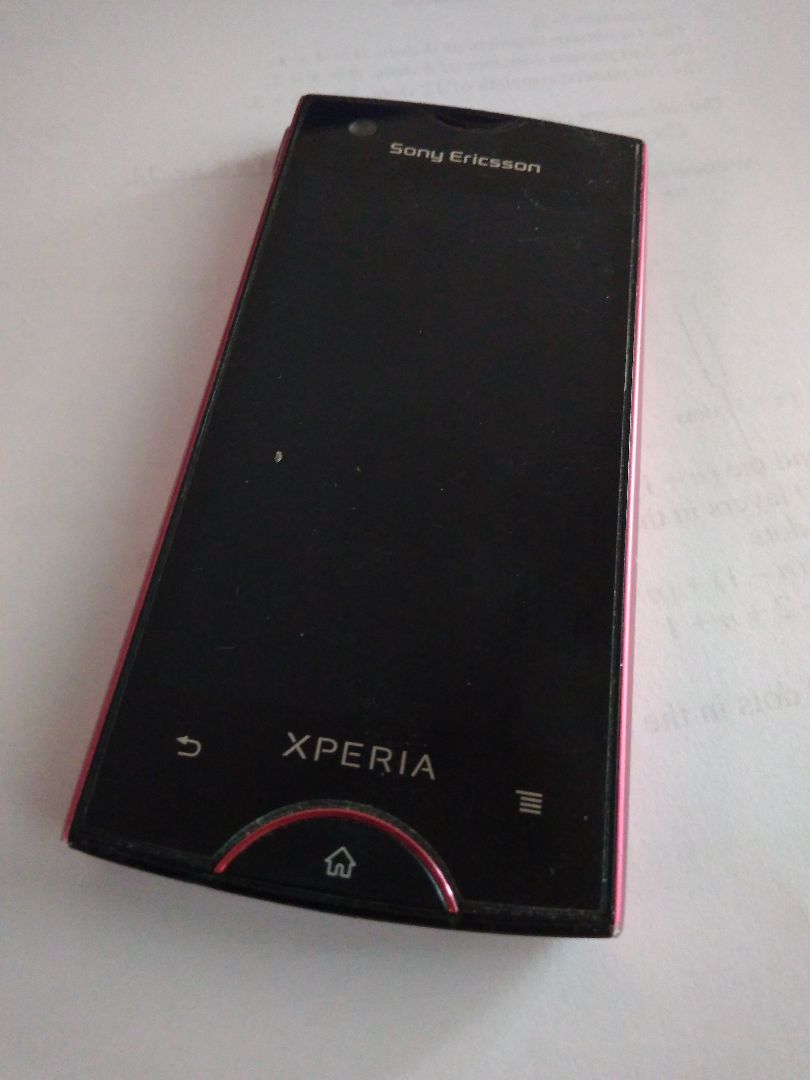 正